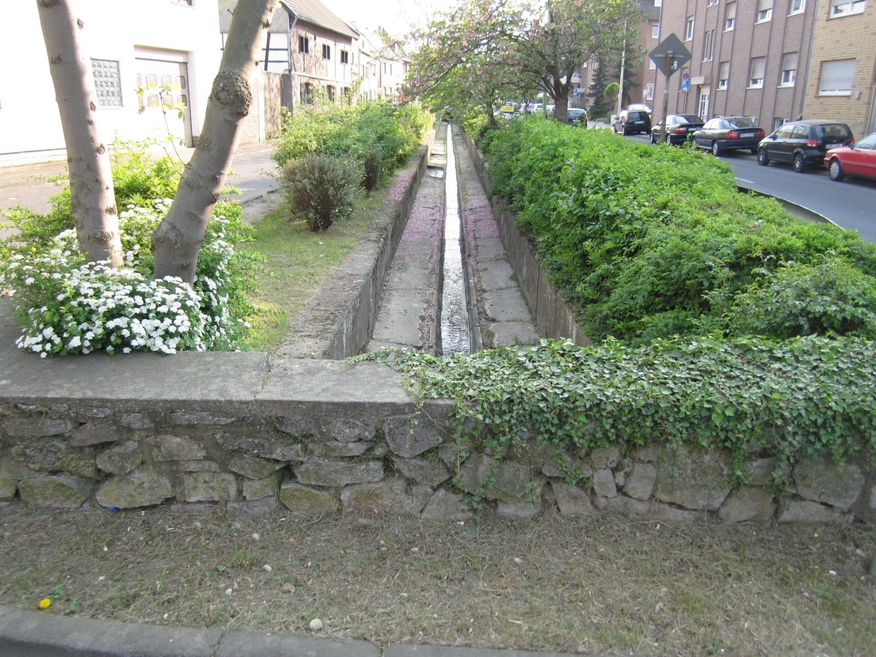 Der obere Teil des denkmalgeschützten Teil des Gürzenicher Bach entlang der Schillingsstraße im Bereich zwischen Brücke Höhe Schillingsstr. 211 und Schillingsstr. 239.